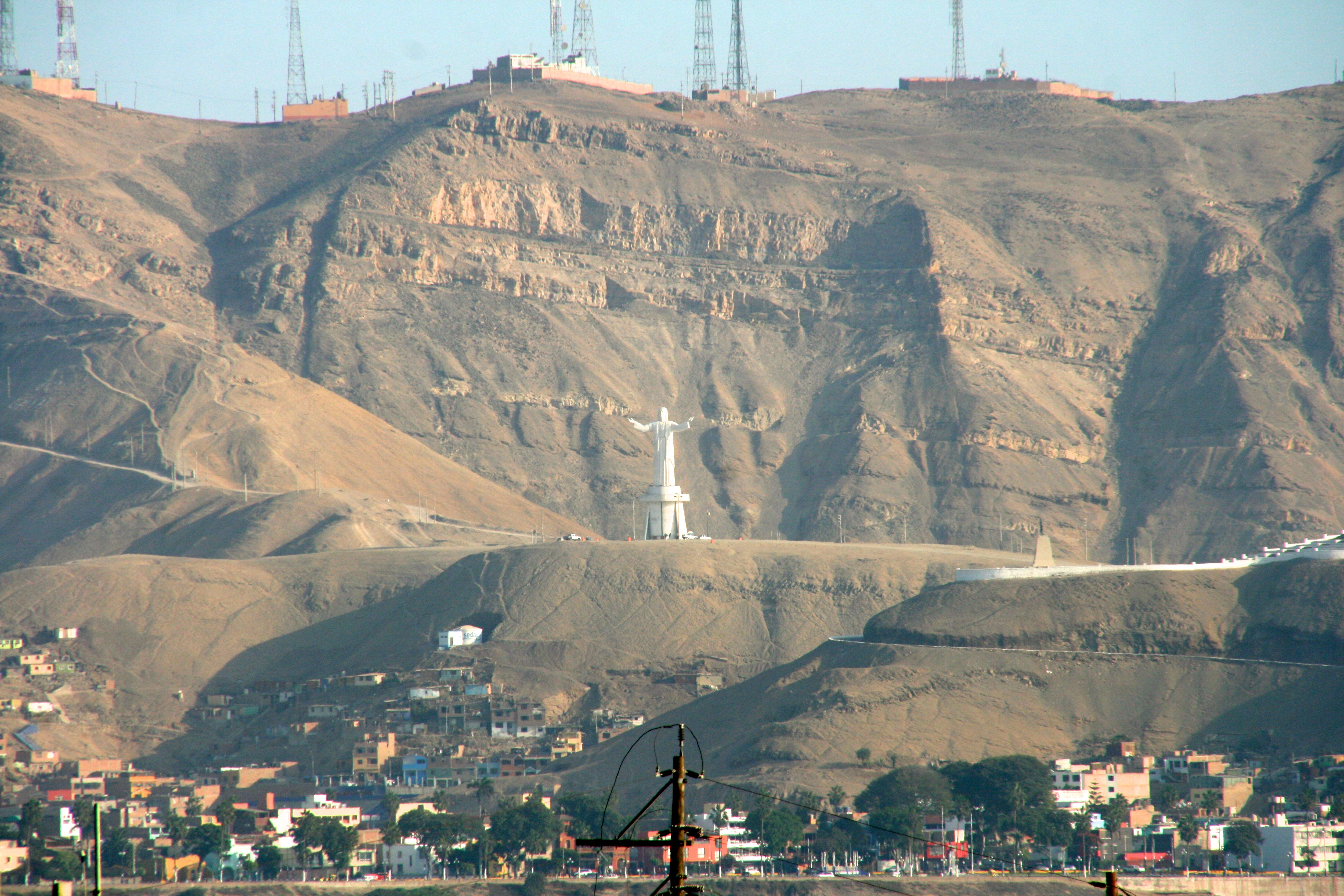 IMG 6716 Pérou, Lima, El Morro Solar, les antennes de transmission et au-dessous le Cristo del Pacifico (Photo de Richard Chalifour)